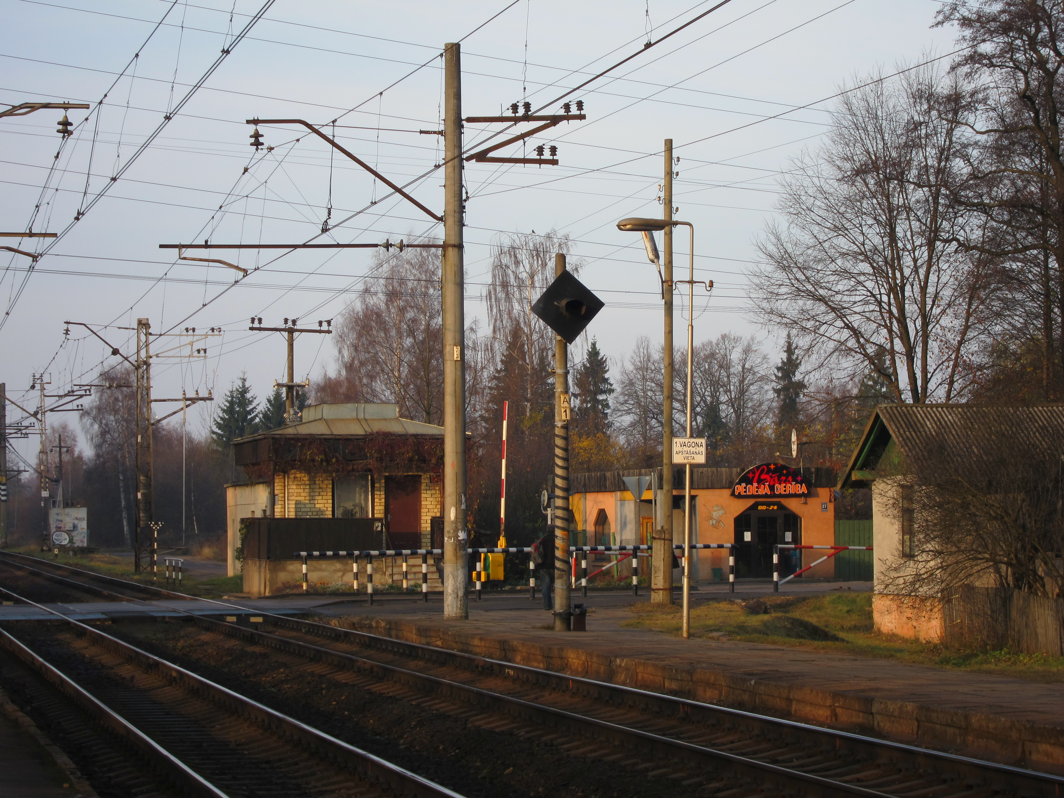 Dzelzceļa pārbrauktuve pie Imantas stacijas.